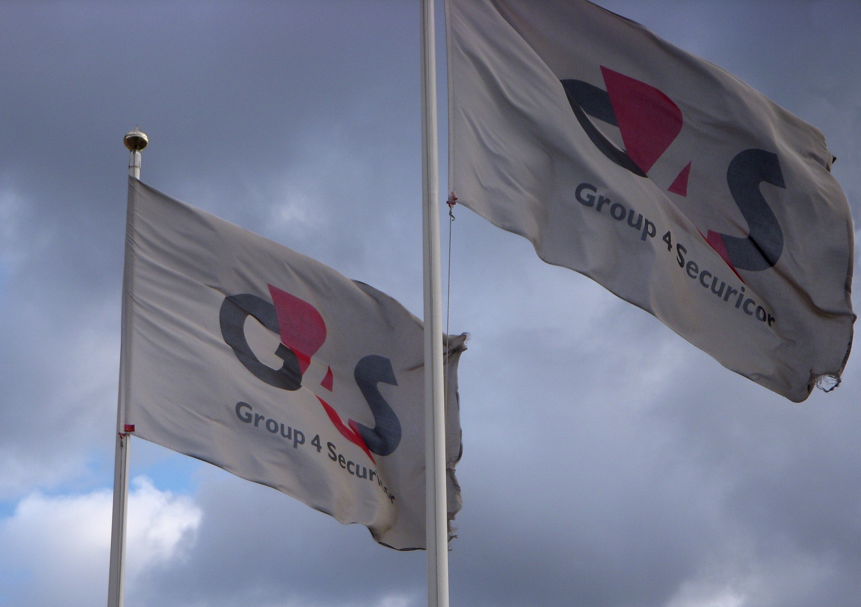 G4S i Västberga, Stockholm